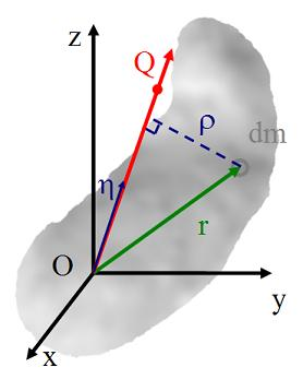 計算任意軸慣性張量